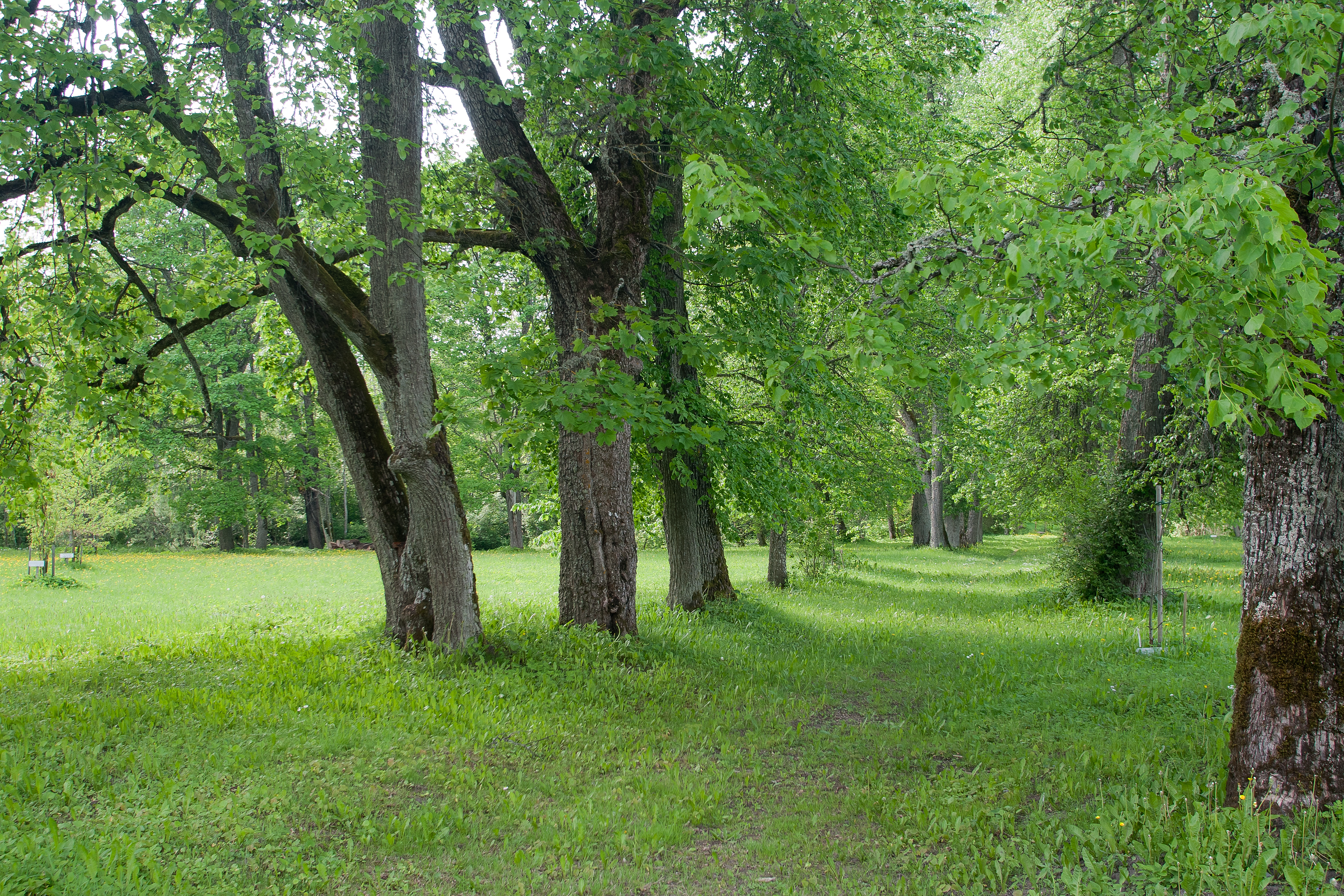 Harmi mõisa park